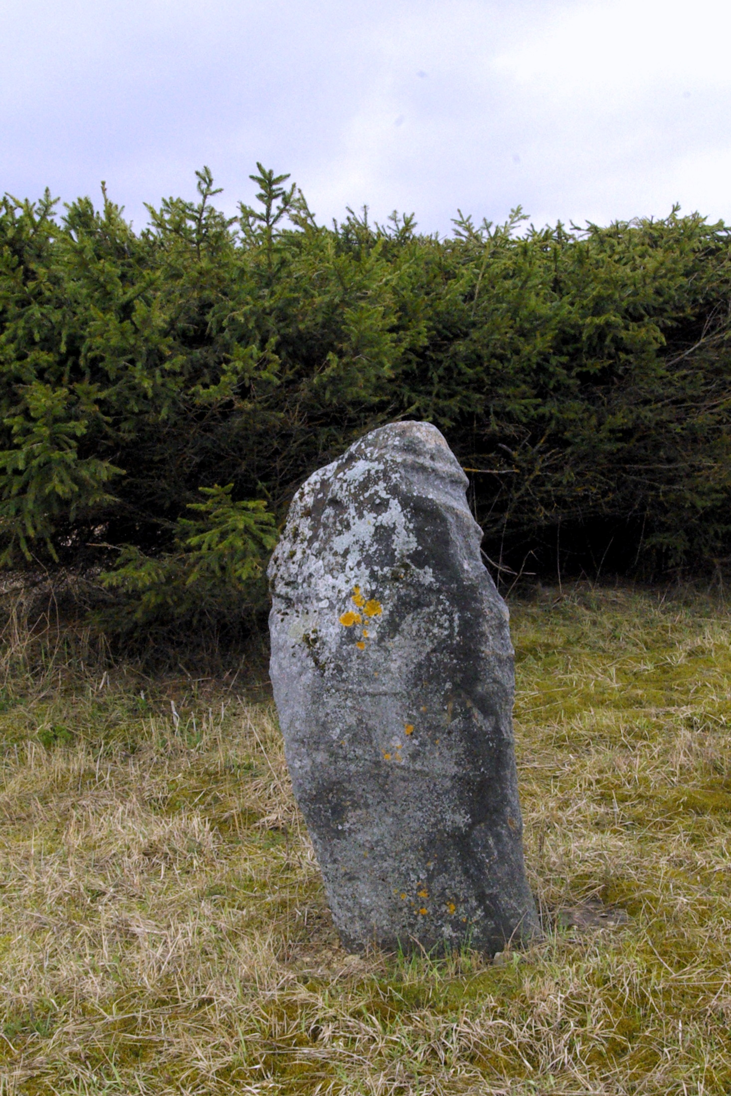 Toolse rannamehe tütar